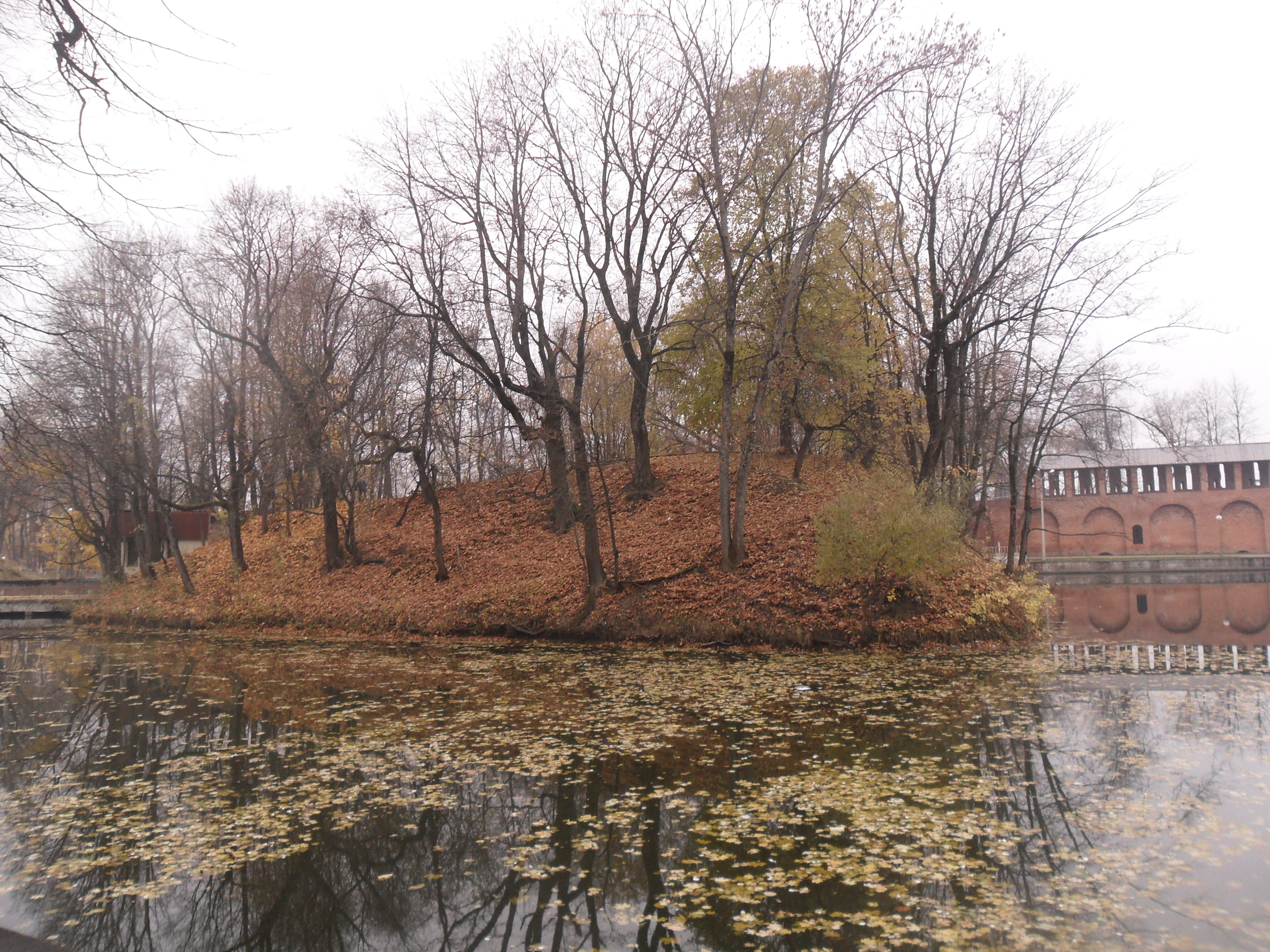 Королевский бастион. Вид с противоположного берега пруда.